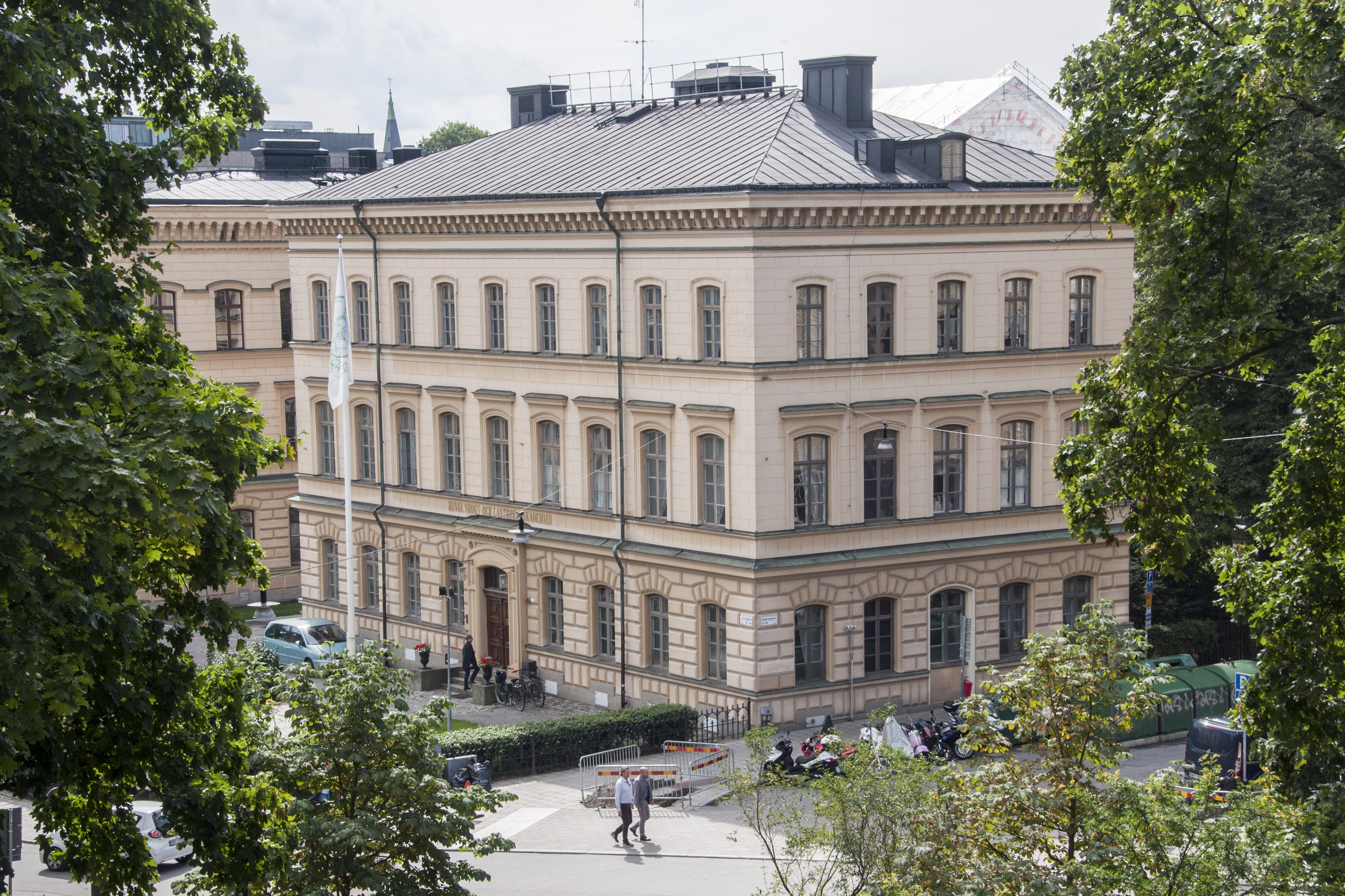 Kungliga Skogs- och Lantbruksakademien, Drottninggatan 95 B. Ursprungligen Bergsskolan. ybyggnadsår 1867 - 1869. Arktiekt Fredrik Wilhelm Scholander.